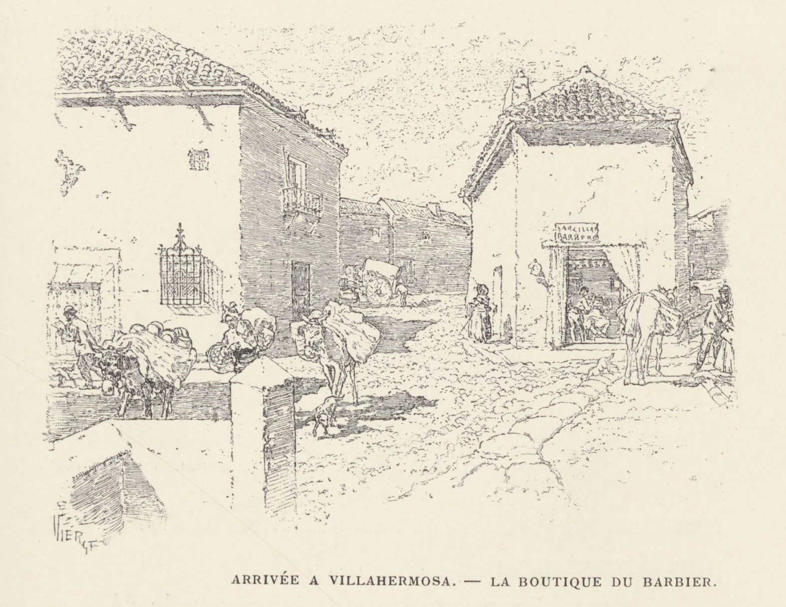 Arrivée a Villahermosa. La boutique du barbier.